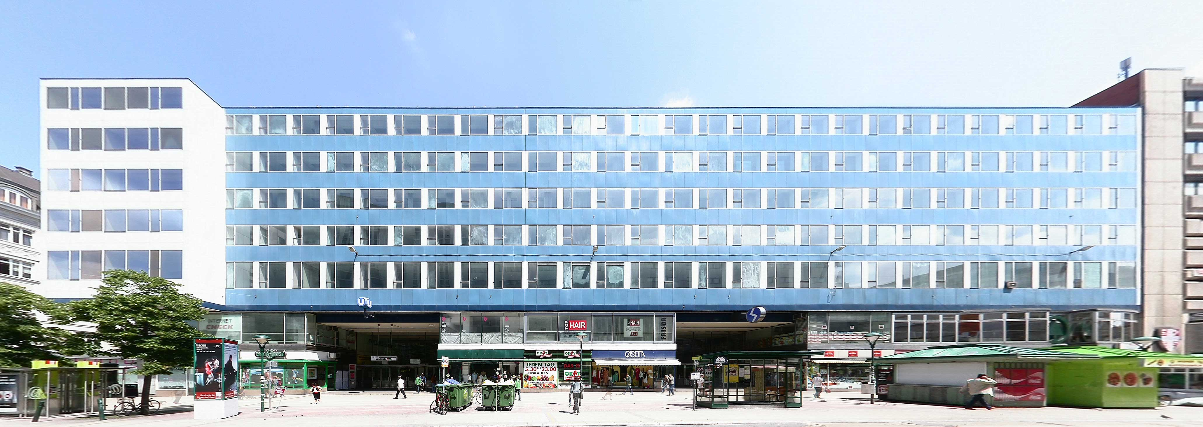 Bahnhof 'Wien Mitte' in Wien Landstraße, Fassade, Tag, Sommer, Blick in Richtung Norden